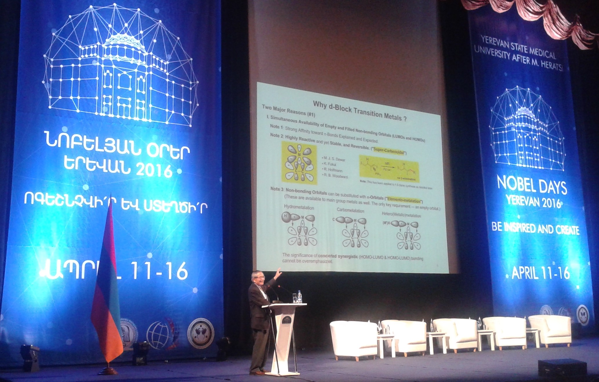 Էյ-Իչի Նեգիշին Երևանում Նոբելյան օրերին, 11-16.04.2016